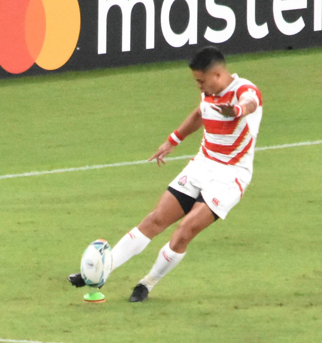 ラグビーワールドカップ2019 田村 優